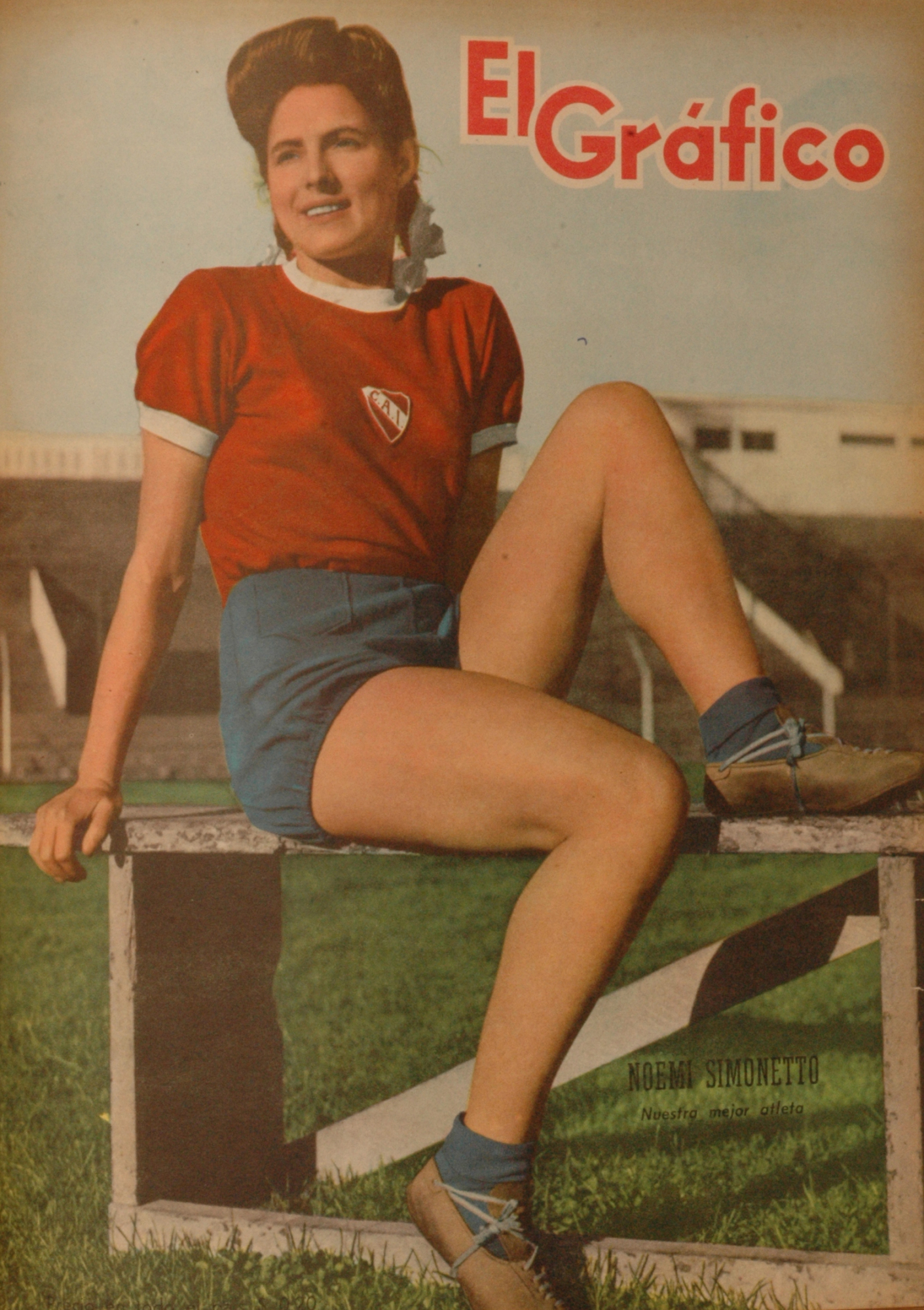 El Grafico del 19 de Octubre de 1945. Edicion 1371